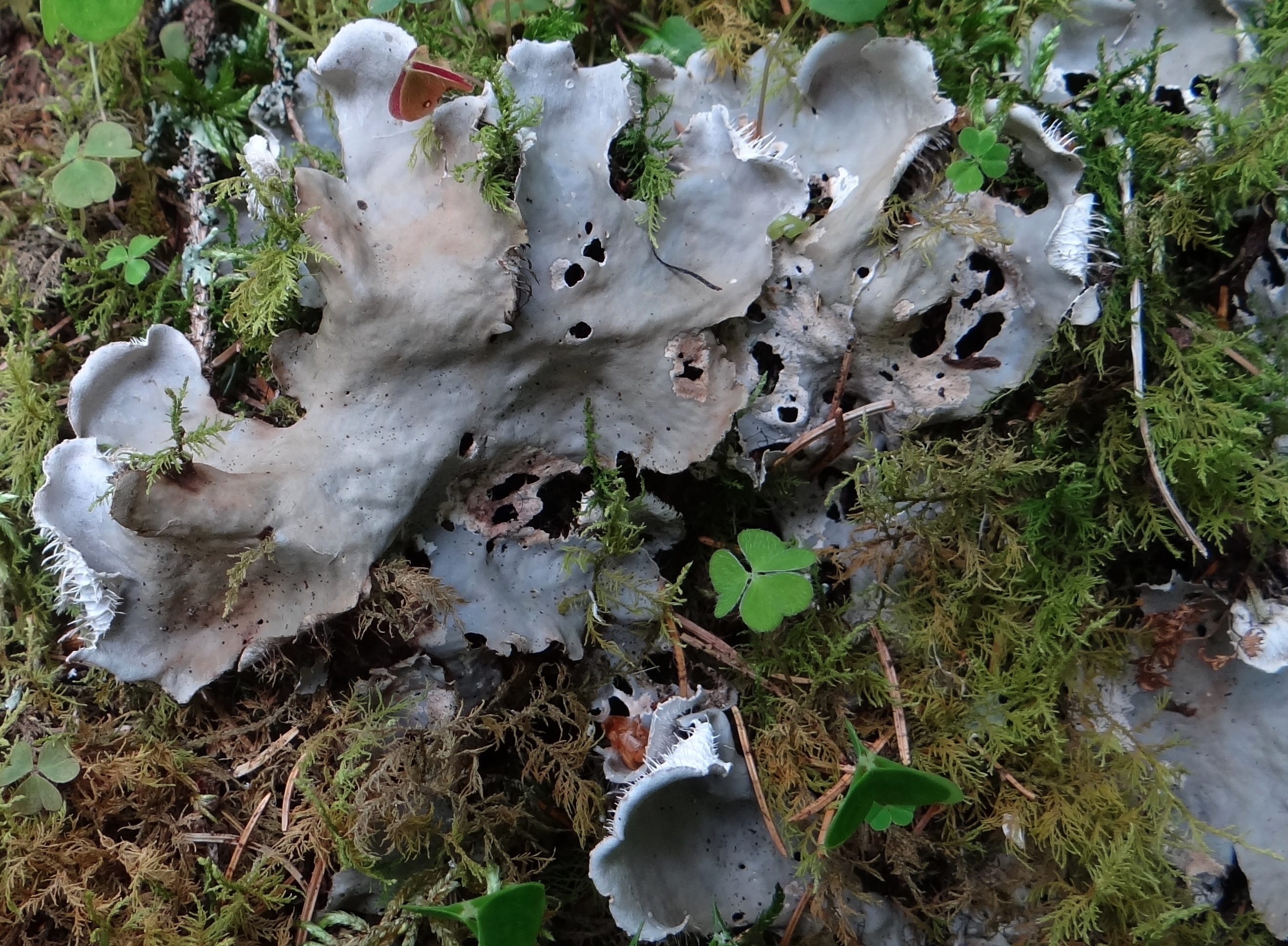 Peltigera canina (habitat:Tatra Mountains, Dolina Małej Łąki, Szatra)